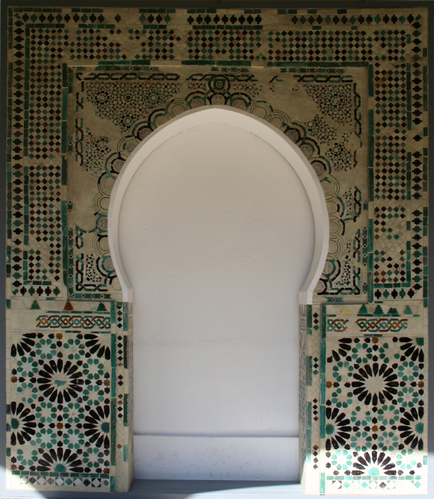 Convento de las Dueñas, Salamanca Horseshoe arch, 14th century date QS:P,+1350-00-00T00:00:00Z/7